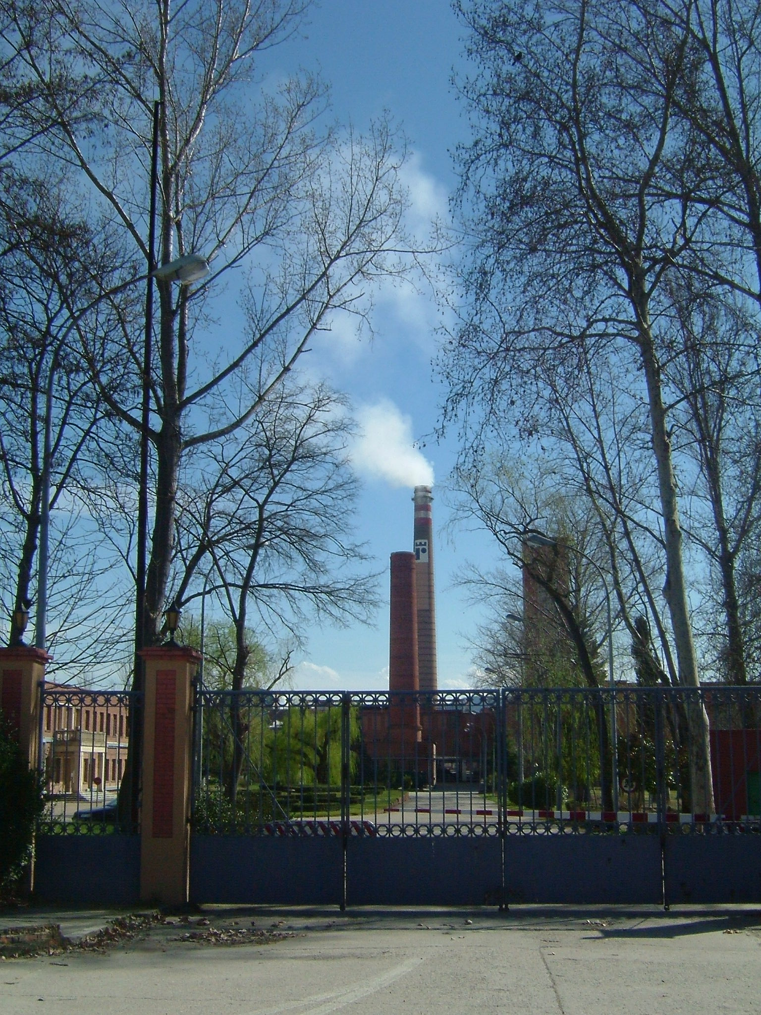 Planta papelera en Miranda de Ebro